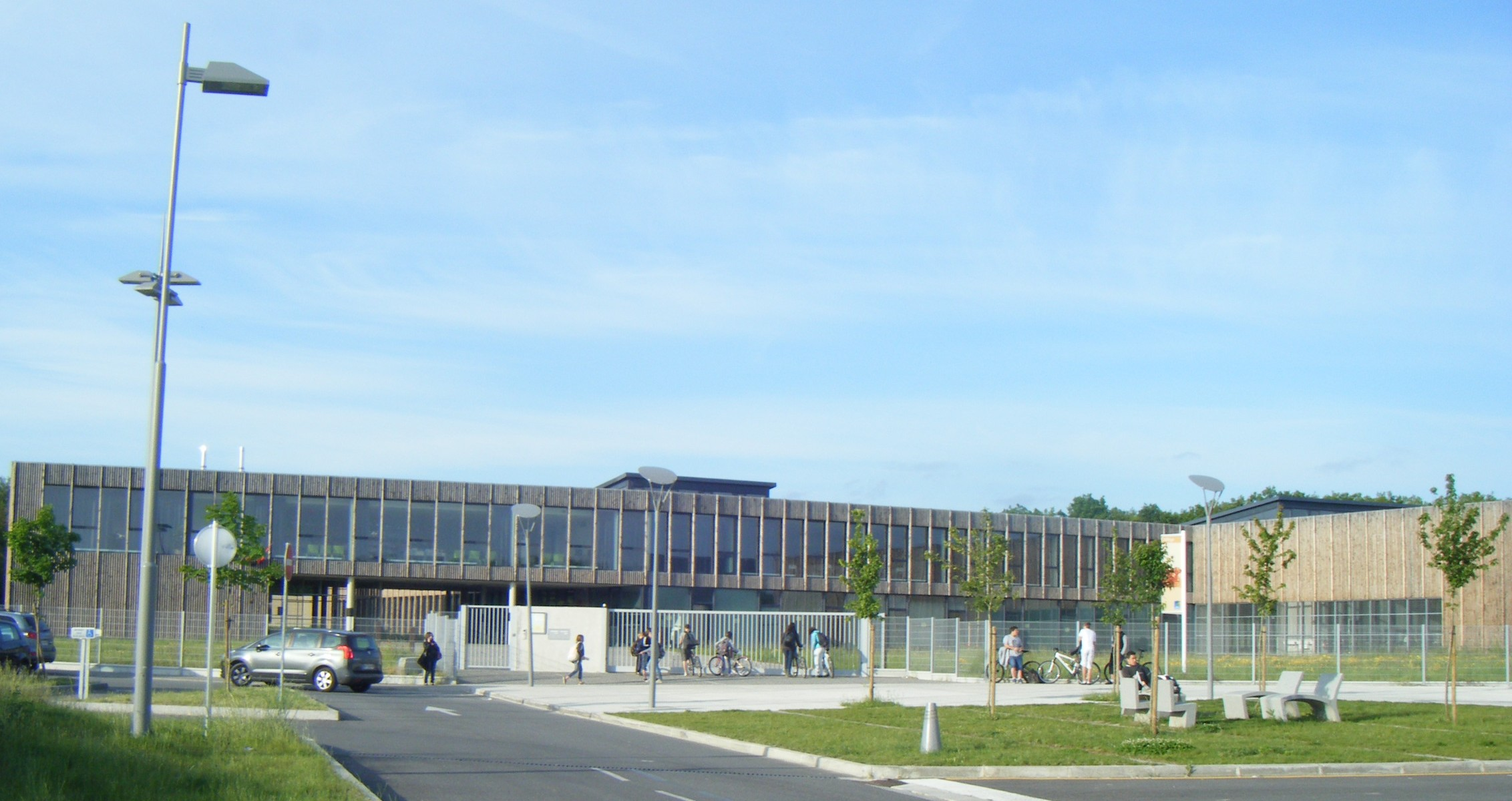 Entrée du collège